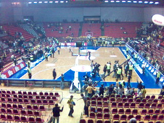 Dosya ile ilgili açıklama